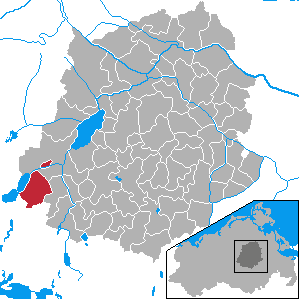 Basedow, Landkreis Demmin, Mecklenburg-Vorpommern